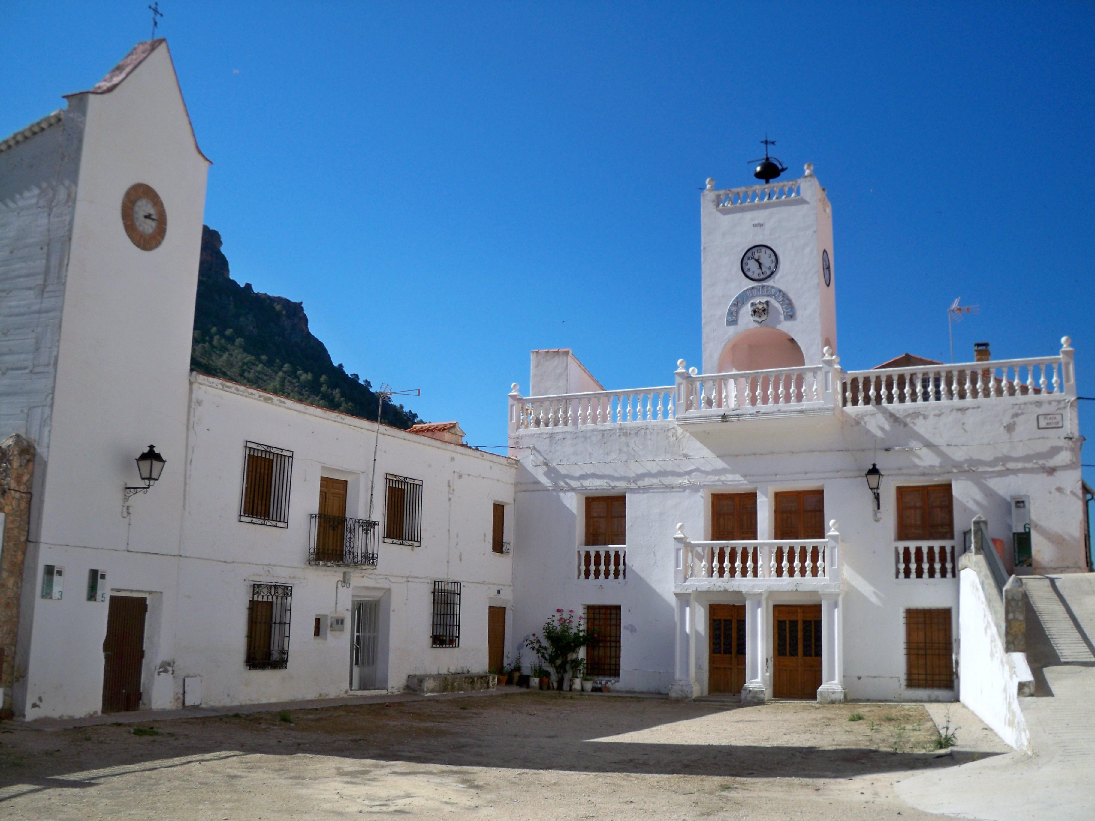 Vista de la plaza Mayor de Molinicos (Albacete), famosa por servir de escenario a la película "Amanece que no es poco" de José Luís Cuerda. El edificio principal, antiguo Consistorio municipal, hoy museo micológico "Casa del Niscalo", data del último tercio del siglo XIX, aunque a mediados del siglo XX se le añadió el reloj. Durante las fiestas populares de la localidad alberga parte de los encierros taurinos, que gozan de gran popularidad y tradición.